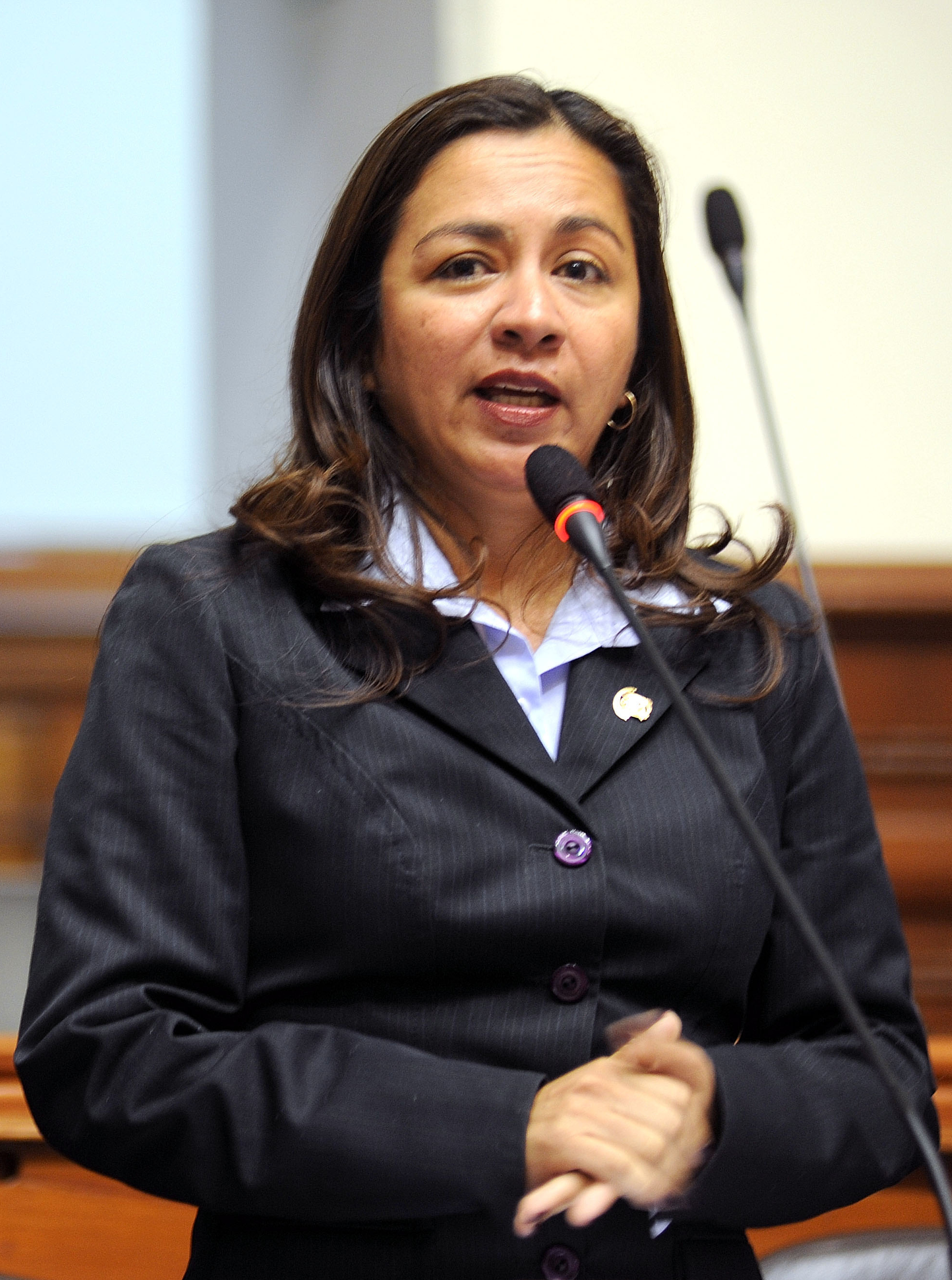 La legisladora Marisol Espinoza fija su posición en el debate parlamentario realizado esta tarde por el Pleno.